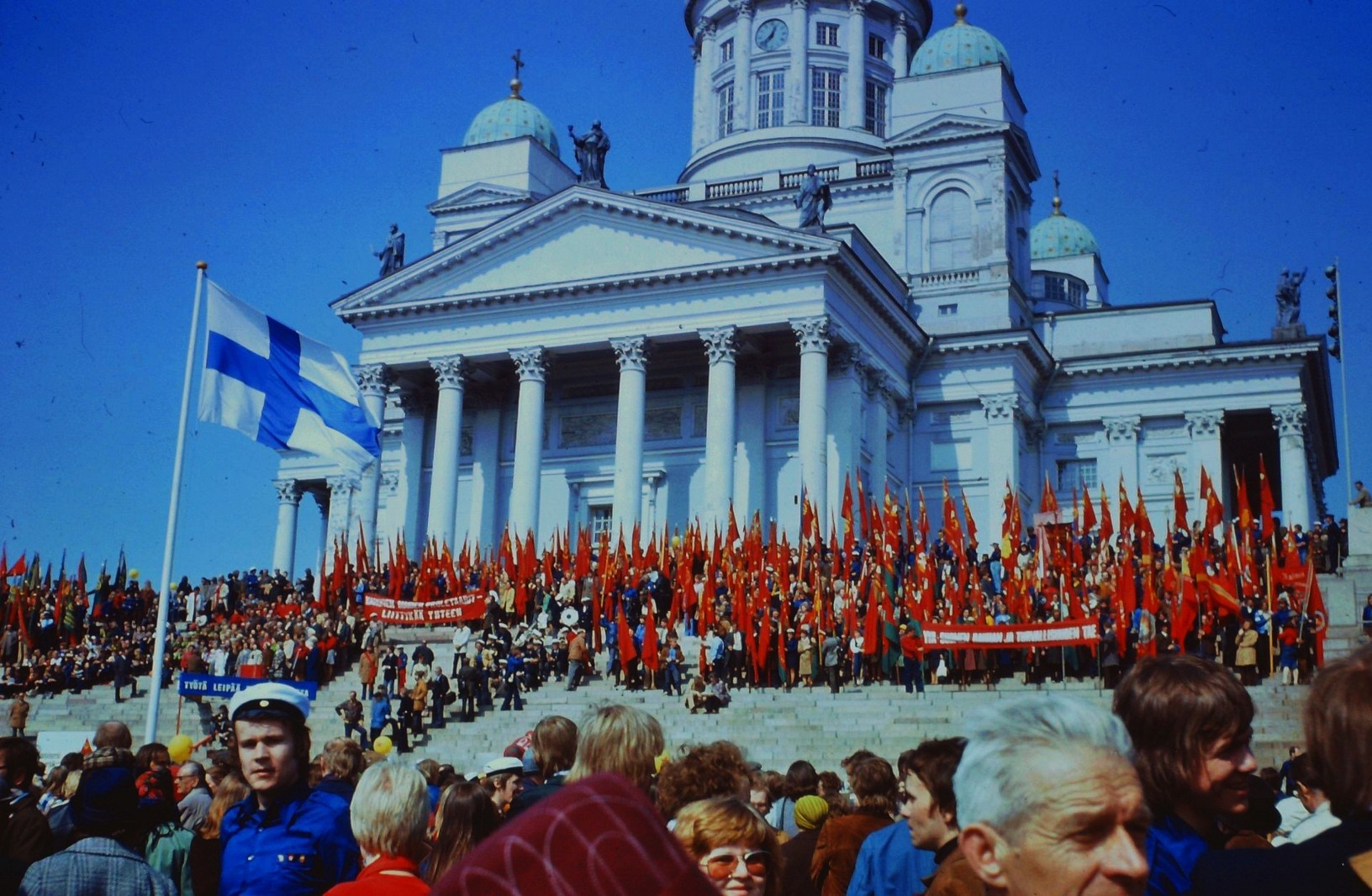 Vappu Helsingissä 1975